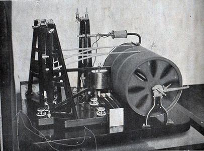 今村式三成分簡単地動計（今村明恒制作）